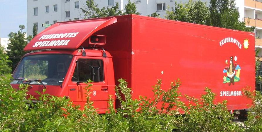 Feuerrotes Spielmobil des Bezirks Berlin-Neukölln. In den Berliner Sommerferien 2007 auf dem Grünstreifen über dem Autobahntunnel neben dem Emmauskirchhof.